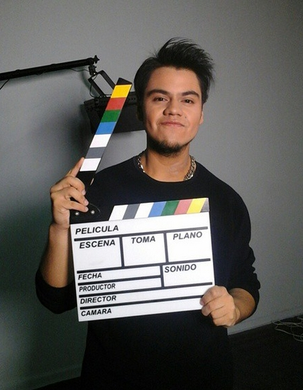 Kevin Vásquez en la Grabacion de su Nuevo Cover Style Spanish Version Original de Taylor Swift